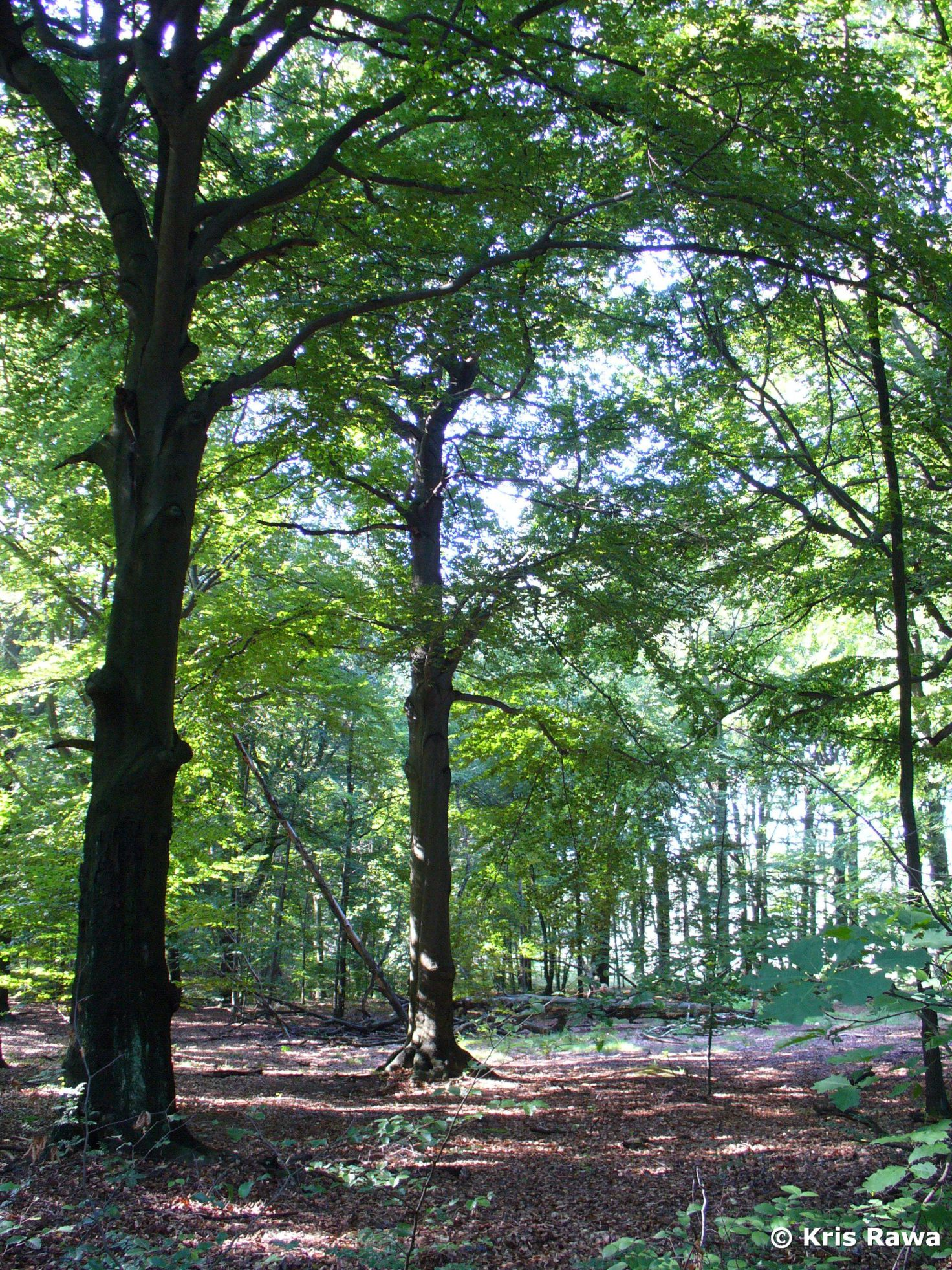 Uroczysko Buczyna